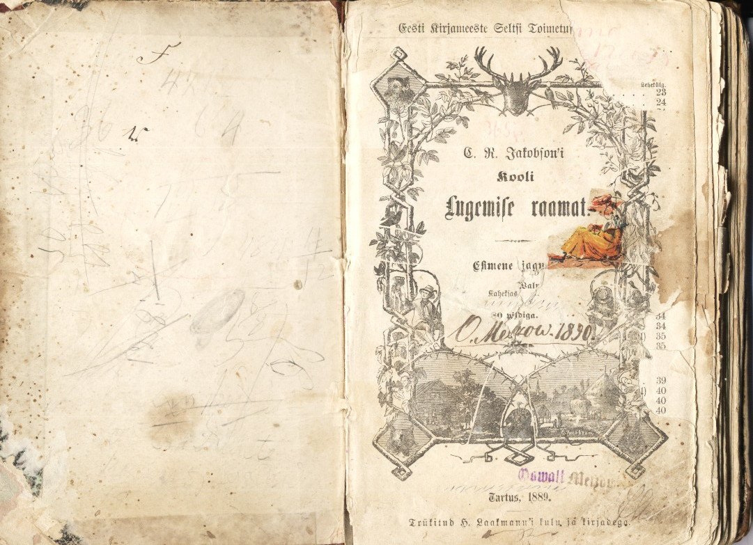 MuuseumikoguArhiivimaterjalid OlemusraamatOriginaaloriginaalSäilivusrahuldav